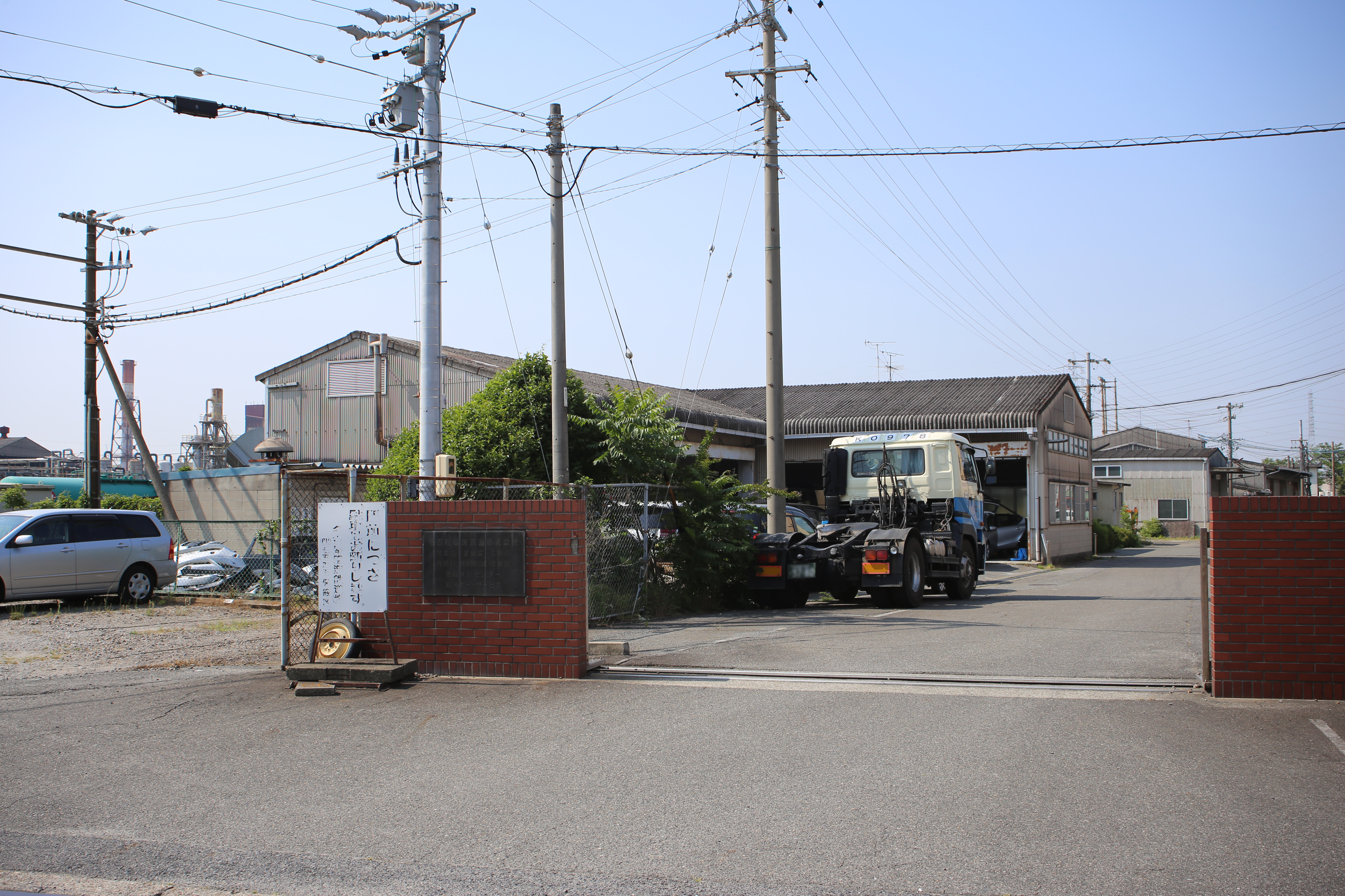 名古屋市南区滝春町の名古屋臨海鉄道本社を南側公道東側より撮影